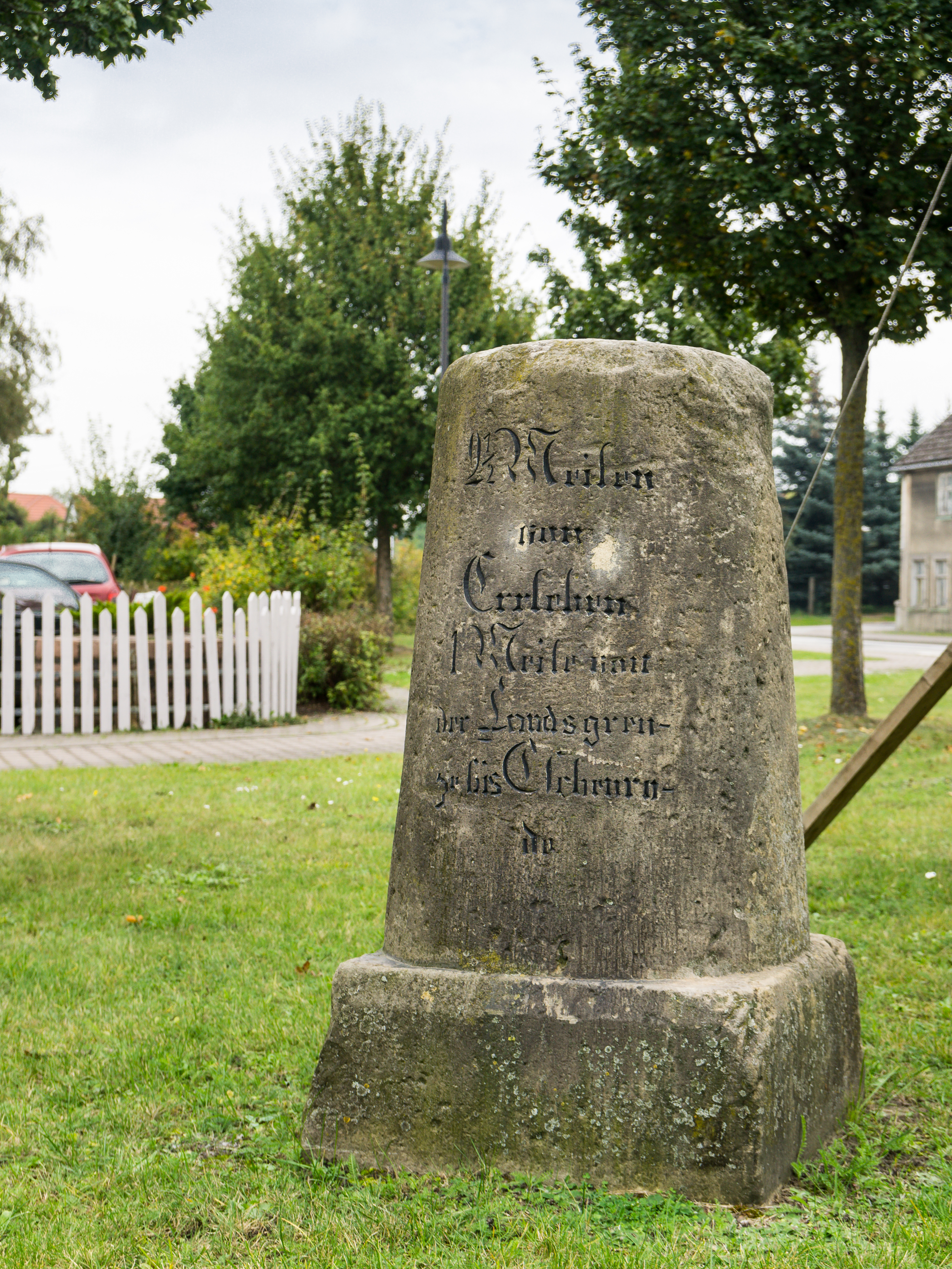 Preußischer Rundsockelstein Friedrichsplatz / Steinweg in Oebisfelde-Weferlingen OT Flecken Weferlingen. Text: 2 1/2 Meilen von Errleben 1 Meile von der Landsgren-ze bis Eschenro-de